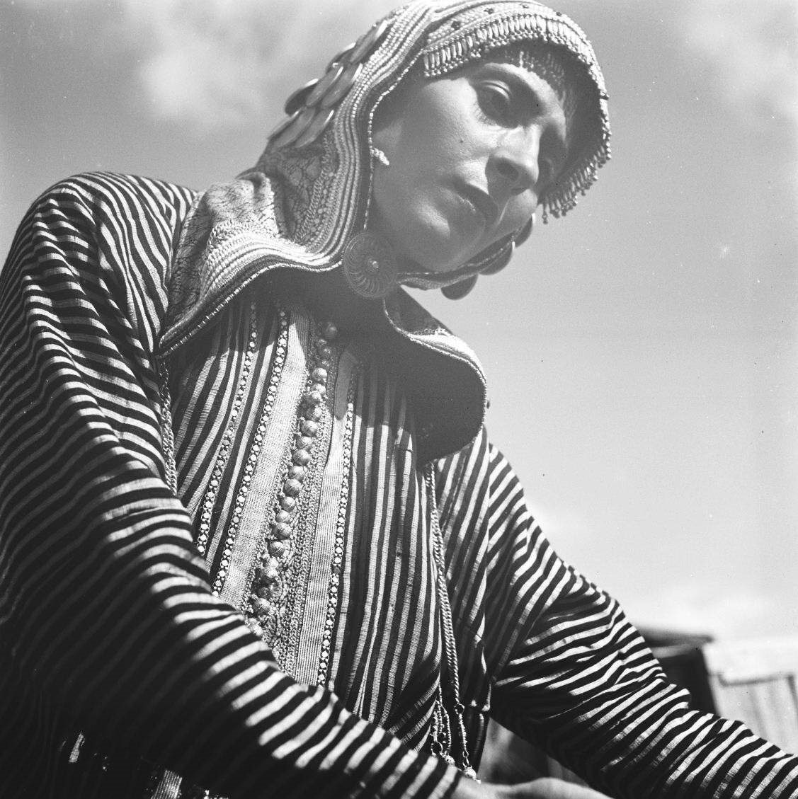 אוסף צילומים של הצלם זולטן קלוגר טווח מספרי התשלילים 30771 - 30889: אשה צעירה תימניה בתלבושת מסורתית